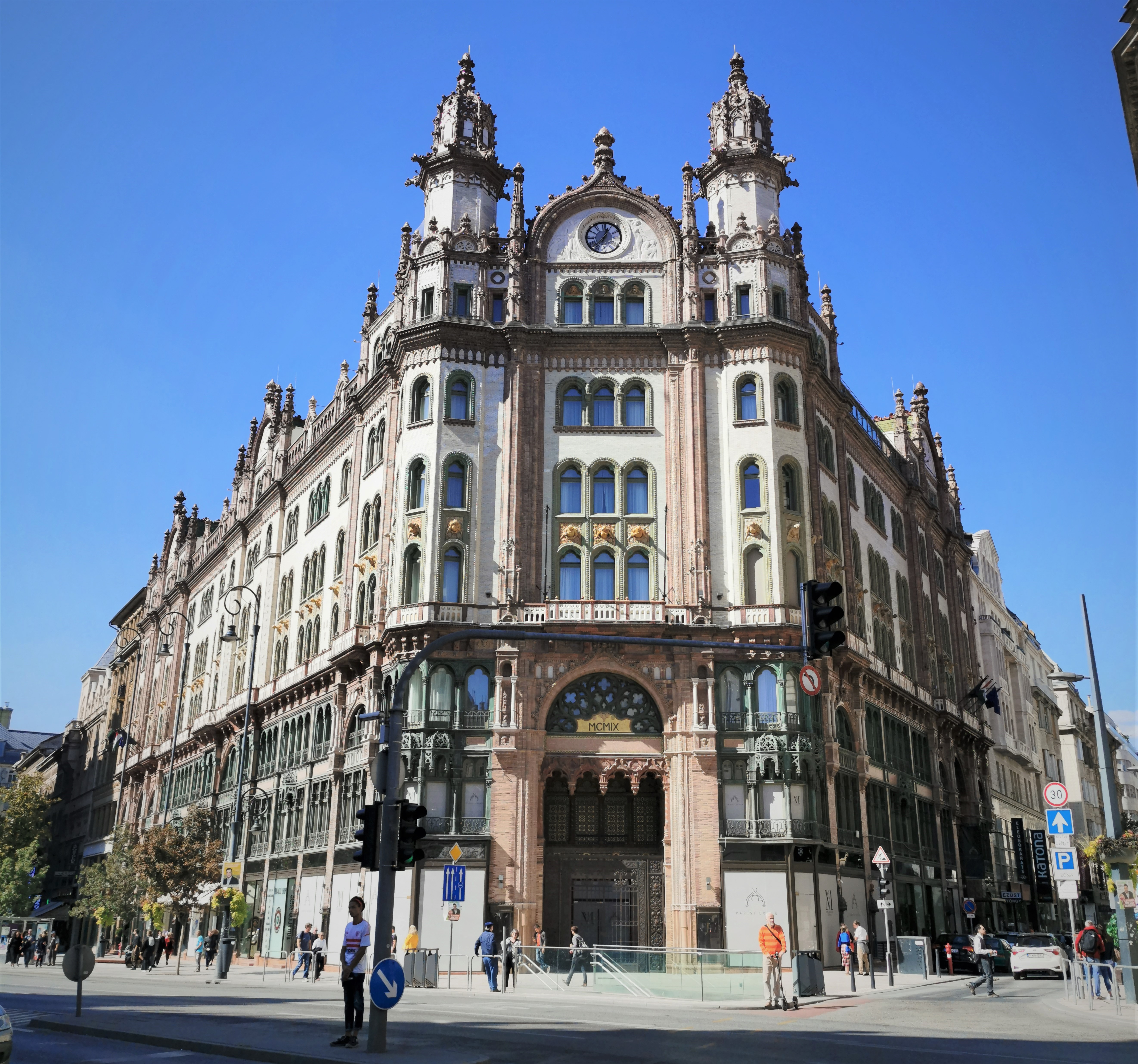 Párizsi udvar a felújítás után.